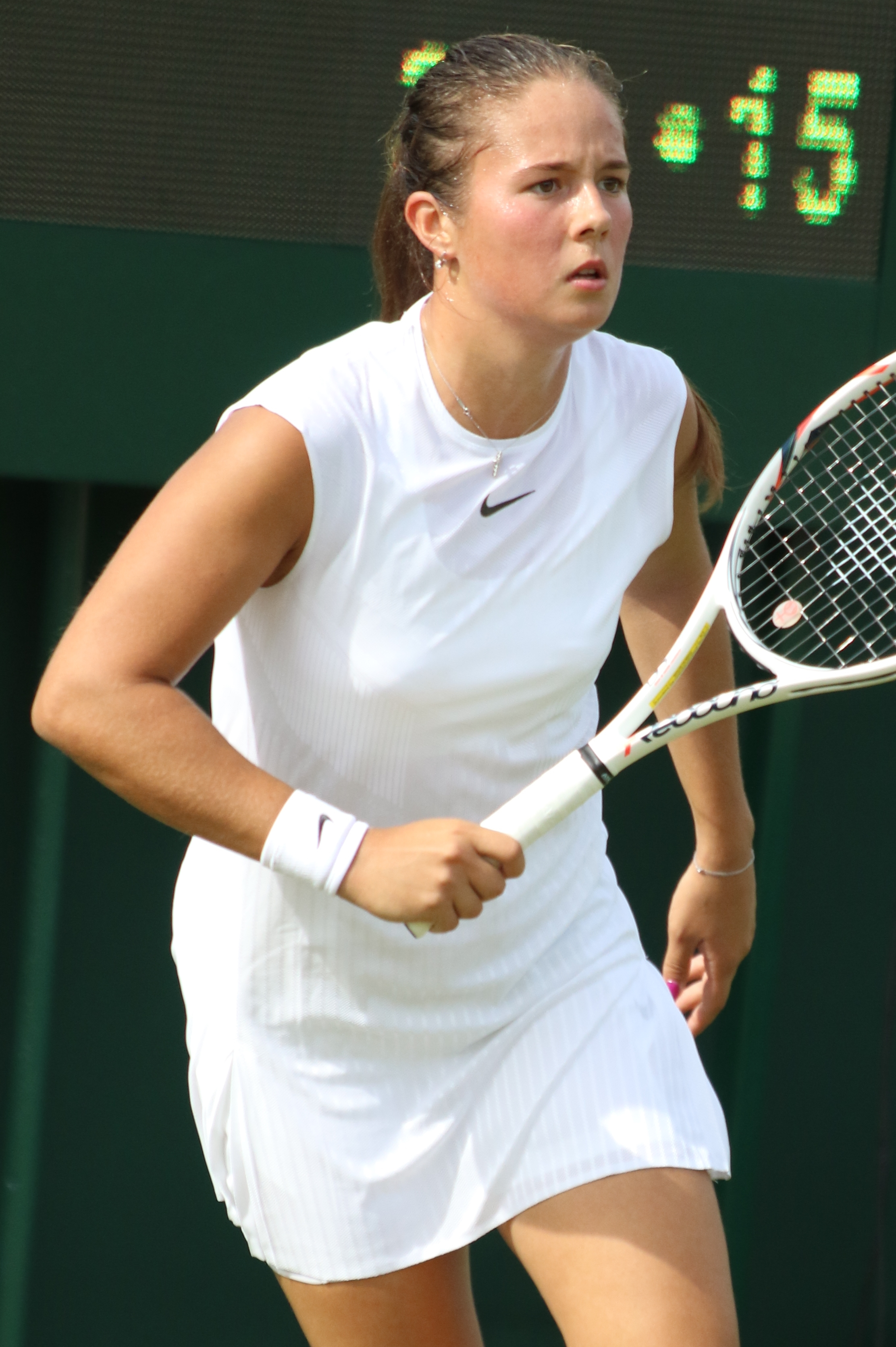 Kasatkina WM17 (8)